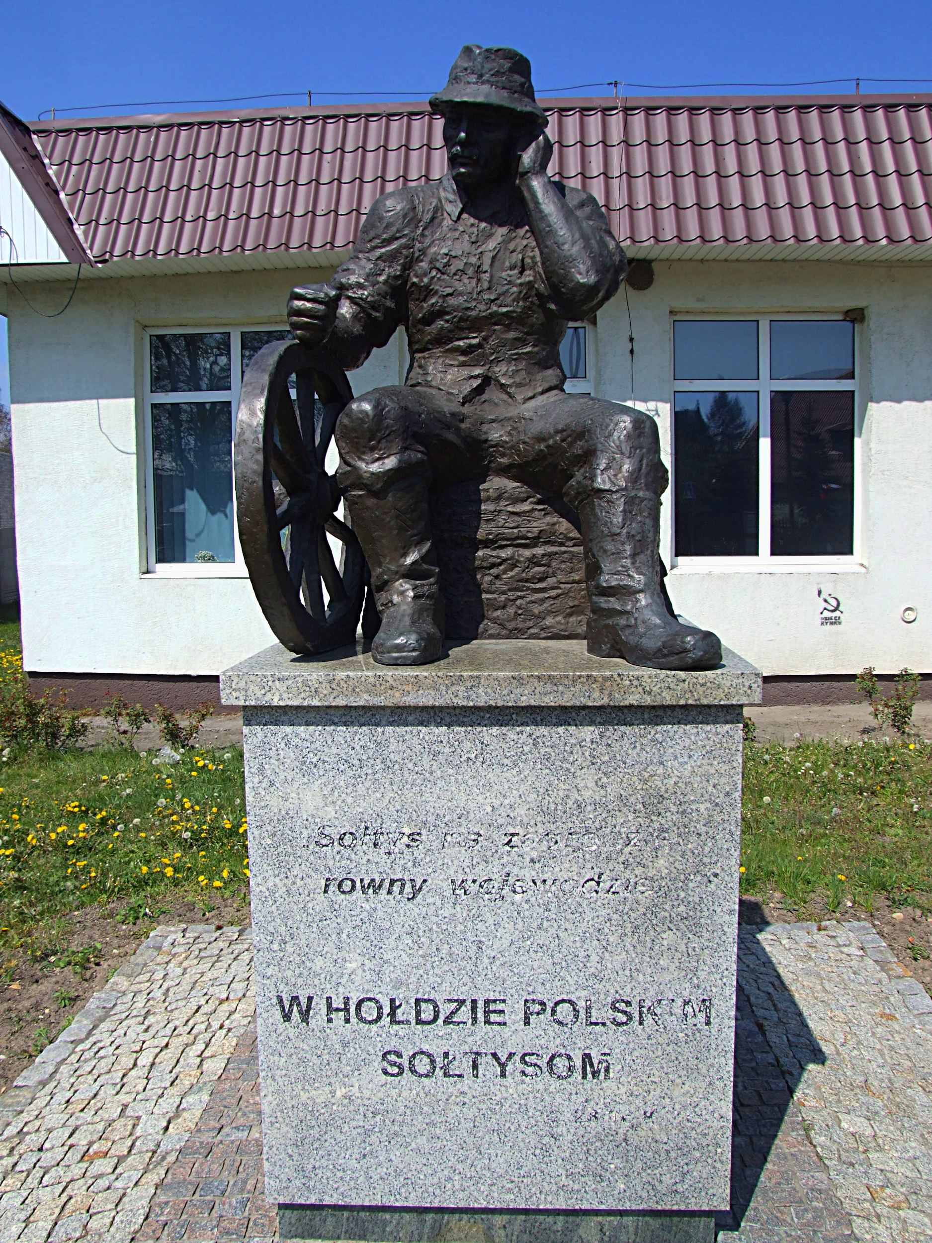 Wąchock - pomnik soltysa